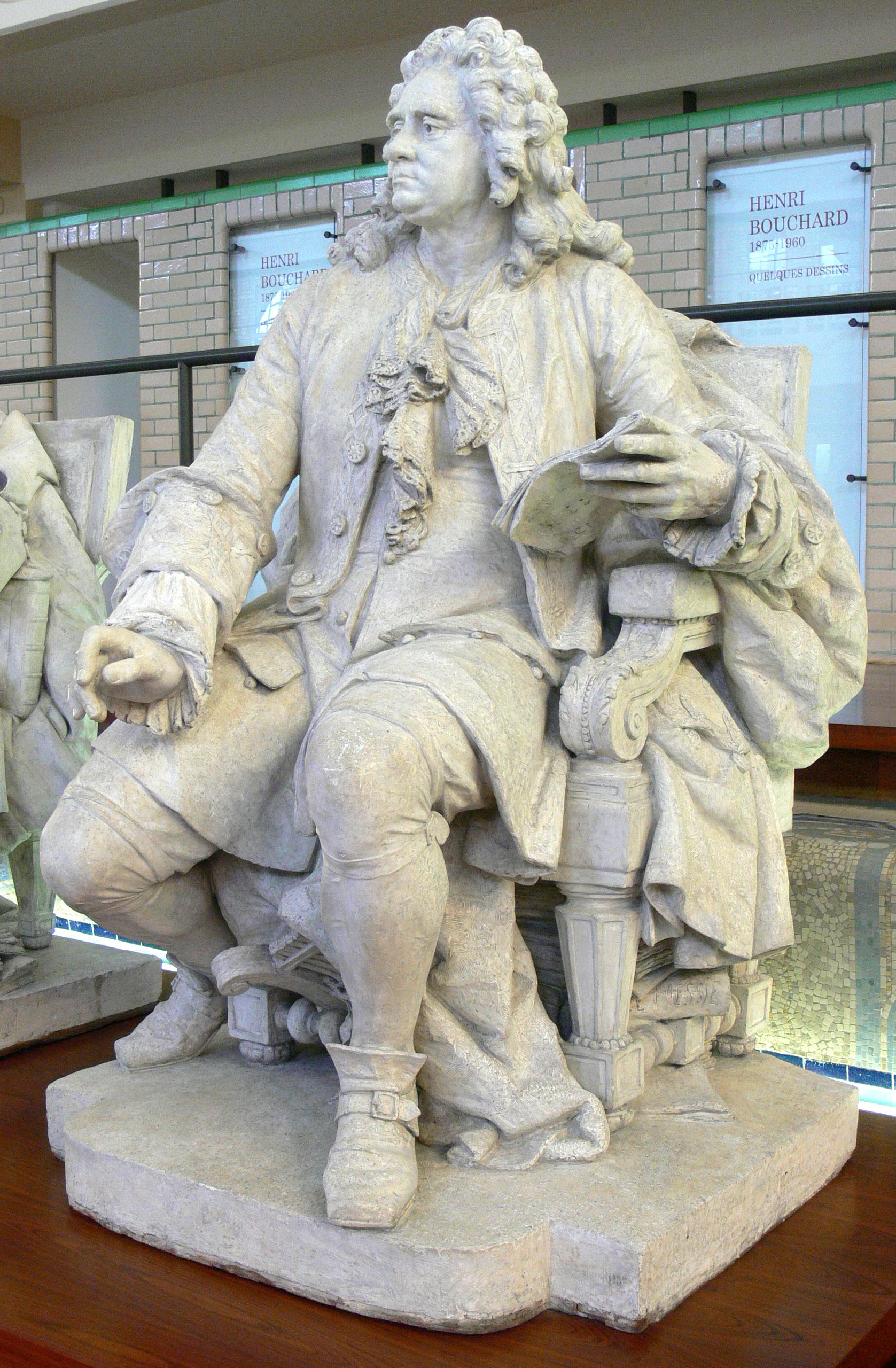 Modèle original en plâtre d'une statue de Georg-Friedrich Haendel par le sculpteur Jules Salmson (1823-1902). Commandée par Charles Garnier pour le décor de l'Opéra de Paris, elle date de 1874. C'est le modèle d'une des quatre statues monumentales du grand vestibule du premier étage de l'Opéra. Elle a été exécutée en marbre entre 1887 et 1888. Conservé à La Piscine, Musée d'Art et d'Industrie (Roubaix) (n° inventaire : 3153-878-26).